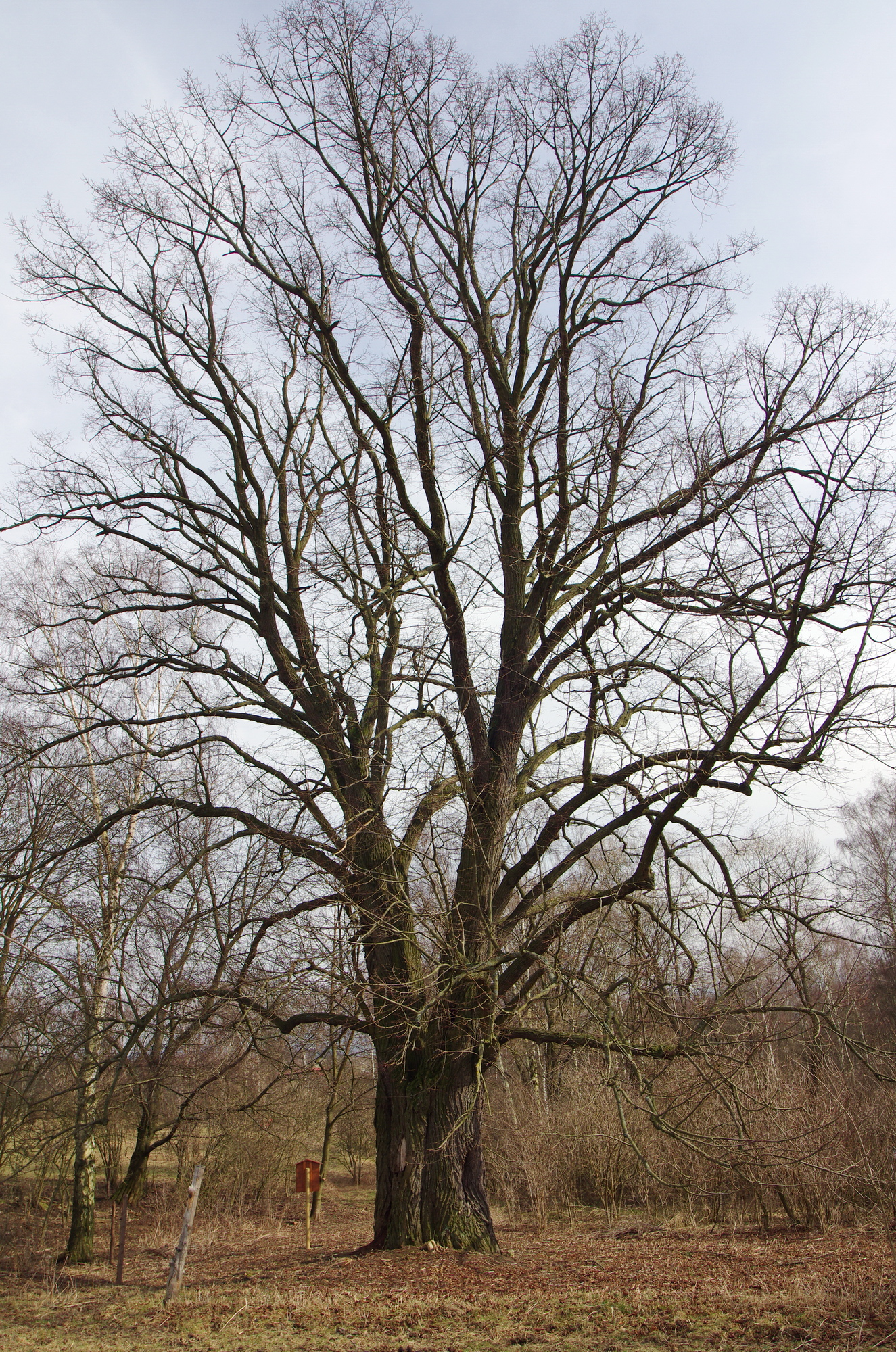 Památný strom Lípa v Horním Žďáru, okres Karlovy Vary